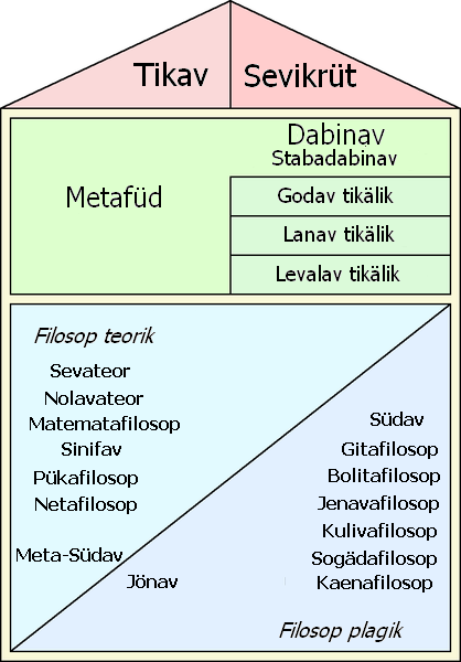 Volapük: Lovelogam jäfüdas filosopa ma donadilam kösömik.